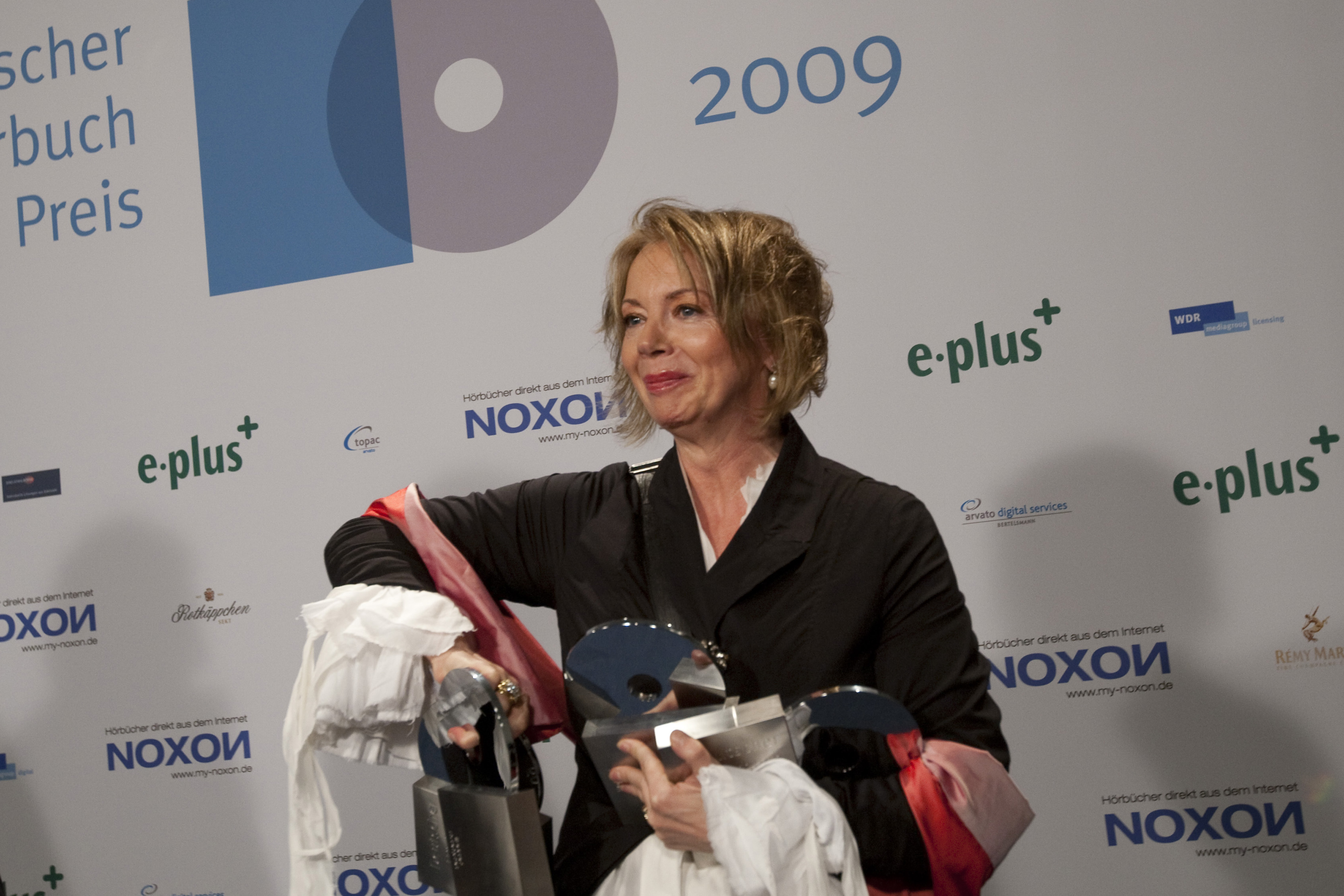 Claudia Baumhöver bei der Verleihung des Deutschen Hörbuchpreises, fotografiert von Herby Sachs (WDR)